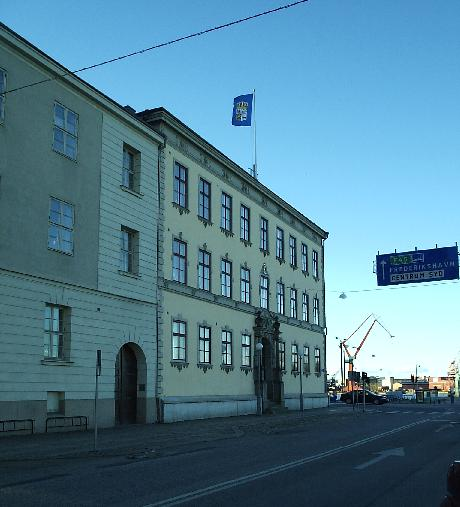 Landshövdingeresidenset i Göteborg, den 19 december 2004. En bild tagen av Harri Blomberg.